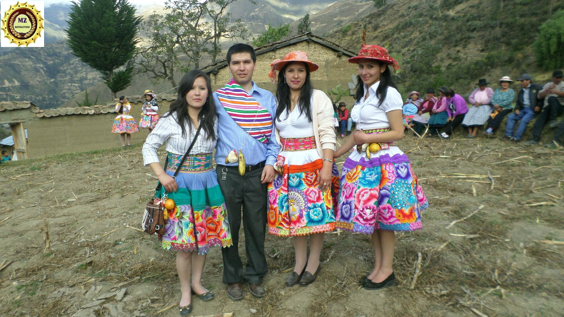 Con mis Hermanas en CHinchihuasi